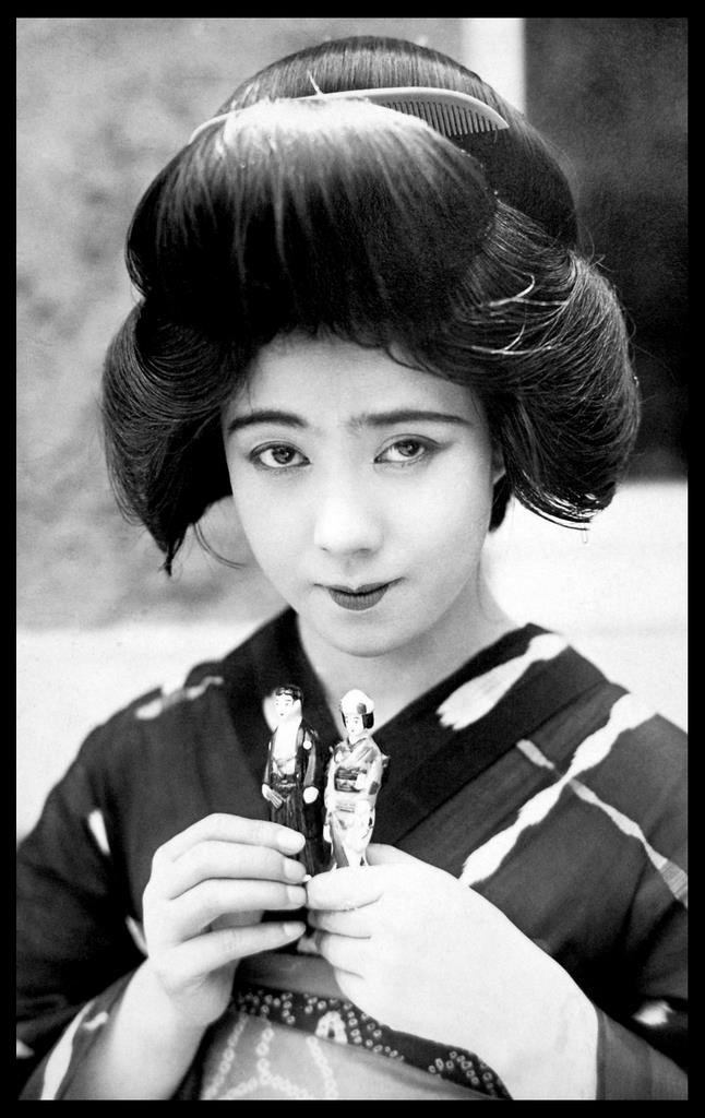 澤蘭子、1920年代の写真